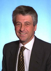 Foto On. Rivera - Camera dei Deputati